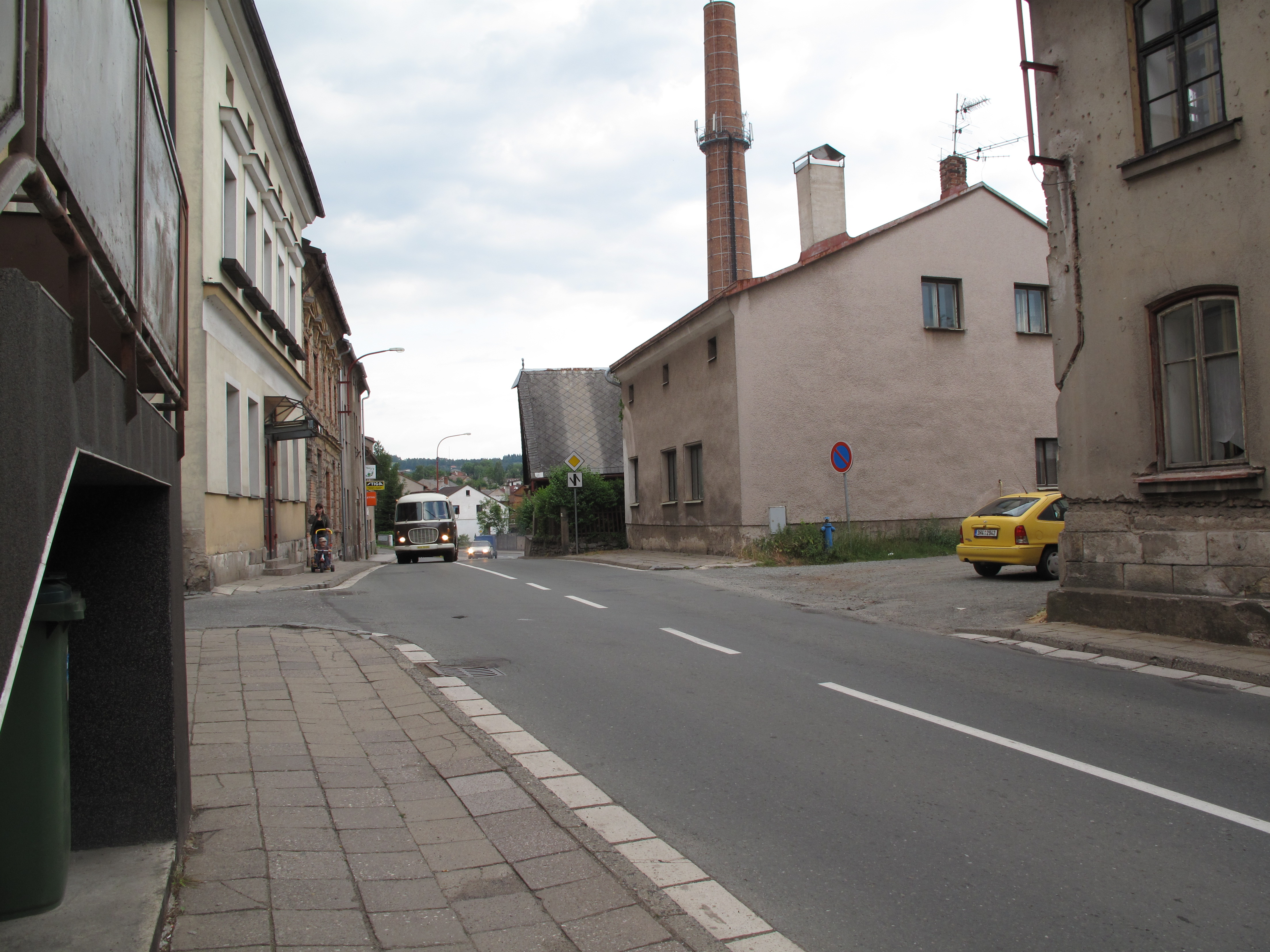 Červený Kostelec